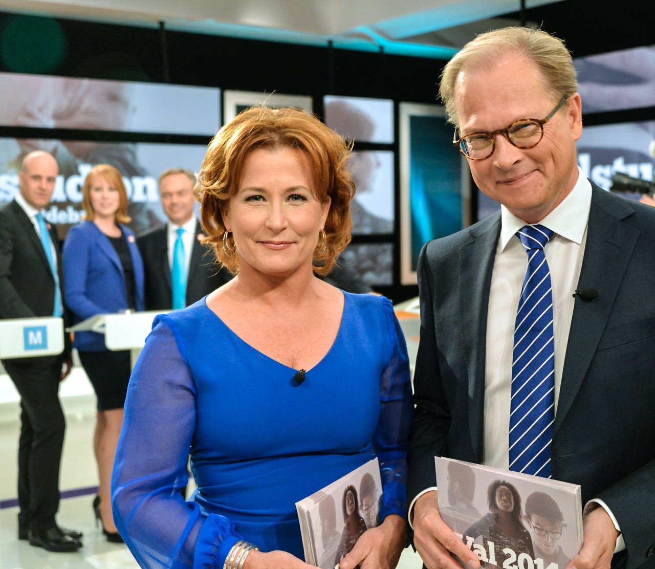 Anna Hedenmo och Mats Knutson inför den avslutande partiledardebatten i SVT den 12 september 2014.